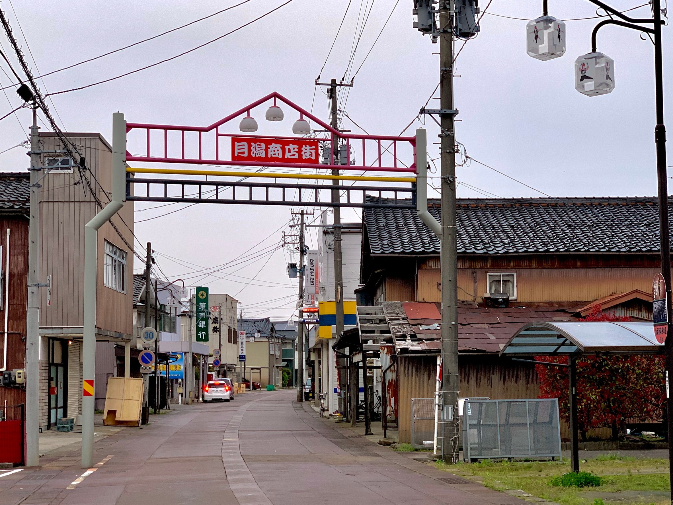 月潟商店街（新潟市南区，2020年4月）